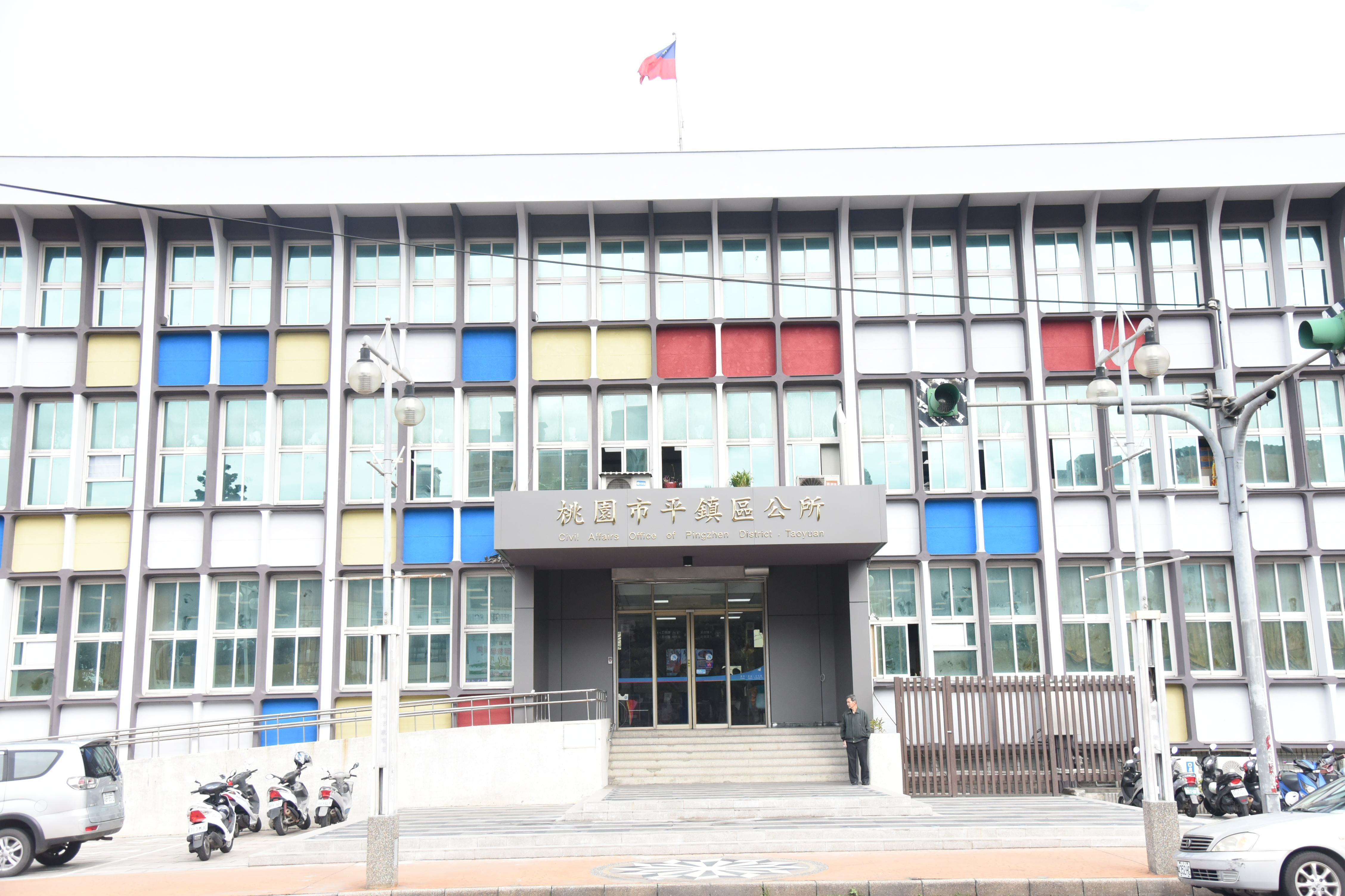 中文（台灣）: 平鎮區公所大門口